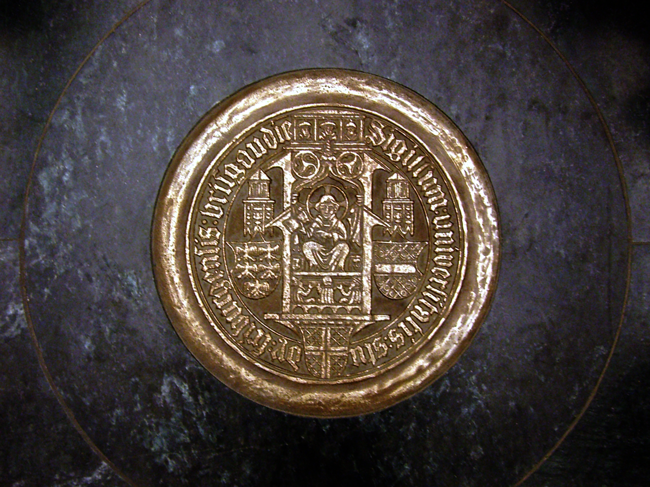 Siegel der Uni Freiburg auf dem Boden im Eingangsbereich der Aula des Kollegiengebäudes I